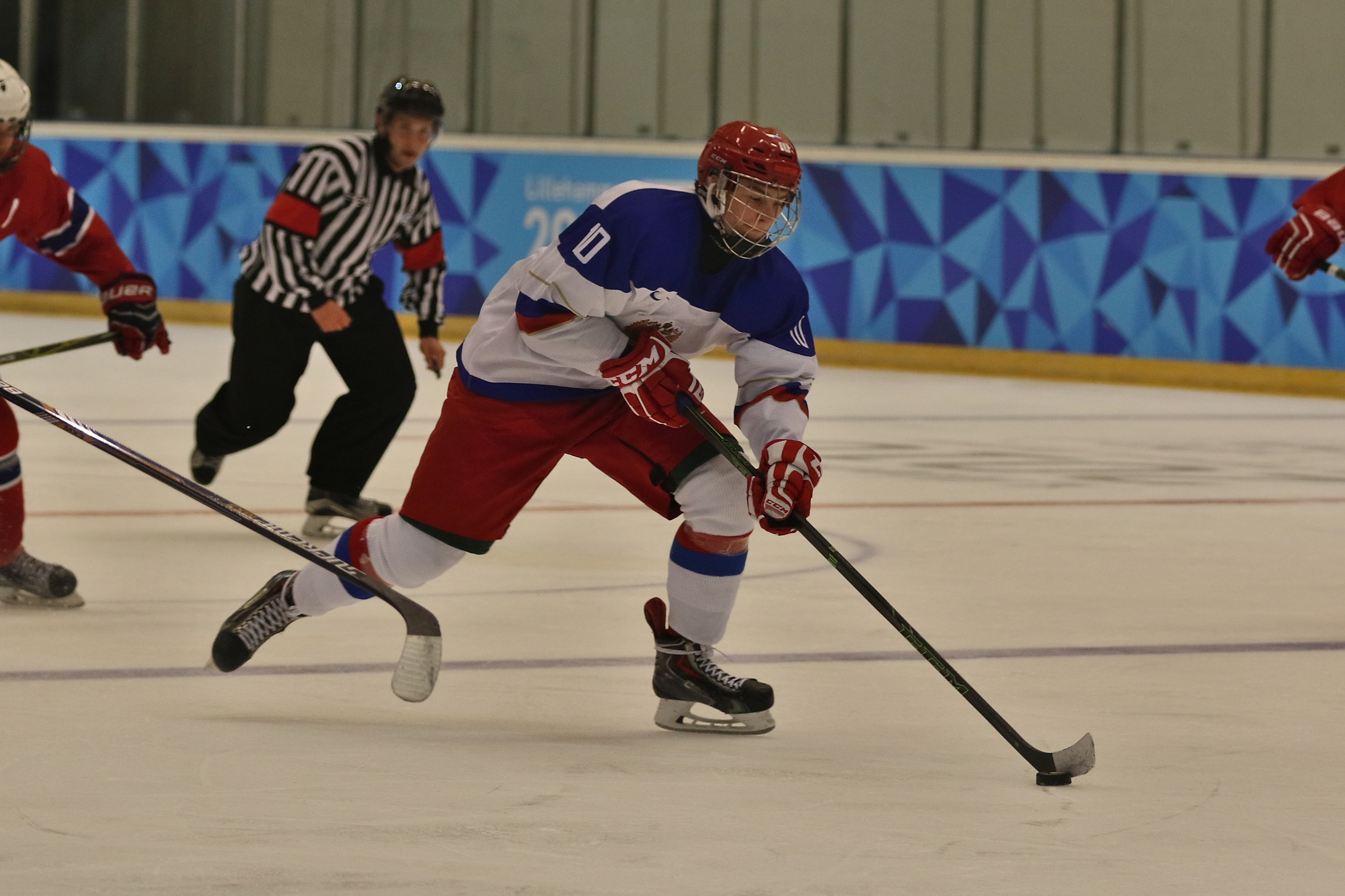 Lillehammer 2016 Hockey Norvège - Russie, Andrei Svechnikov (Russie)